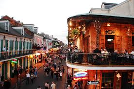 Bourbon street in New Orlean